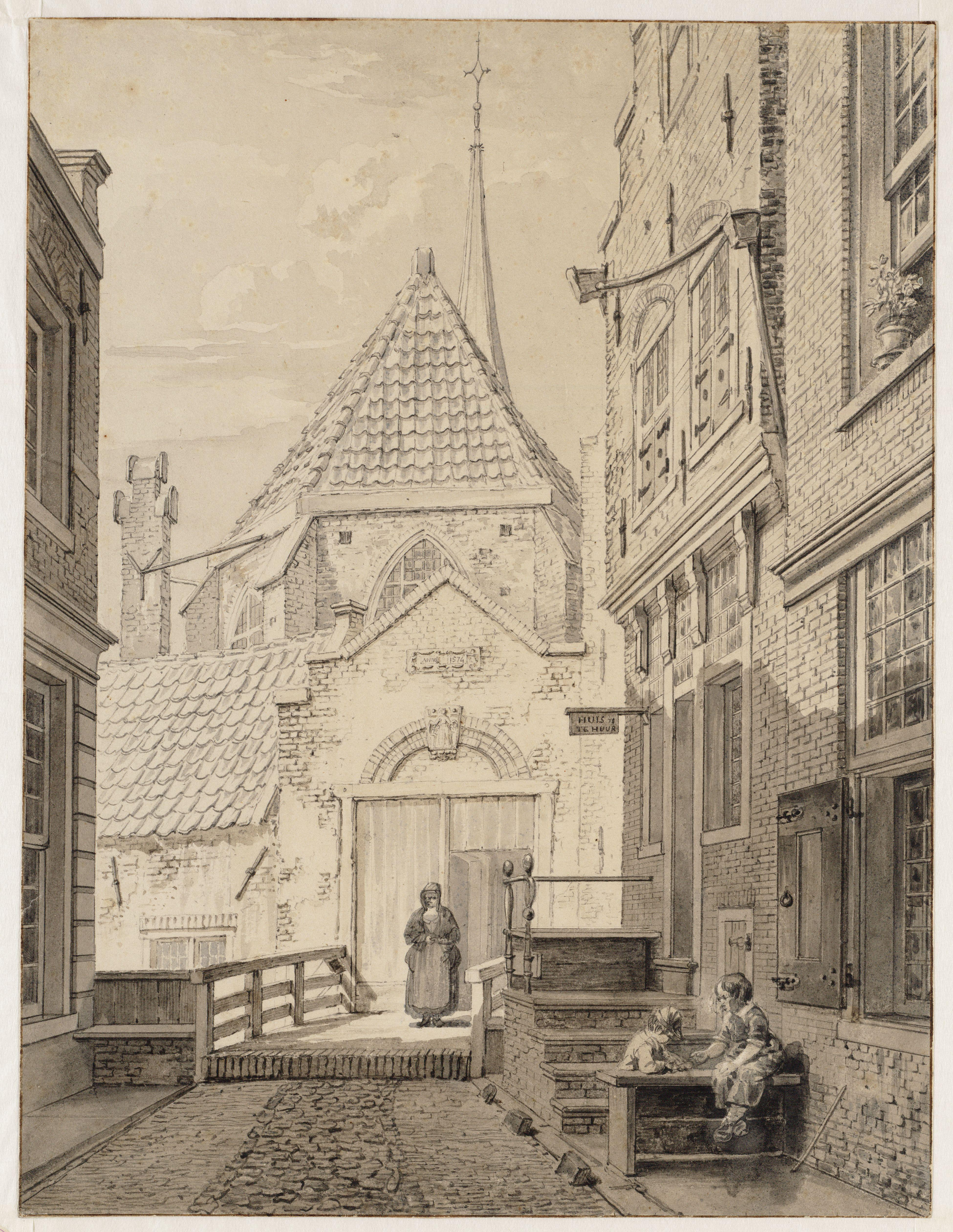 Begijnensteeg.